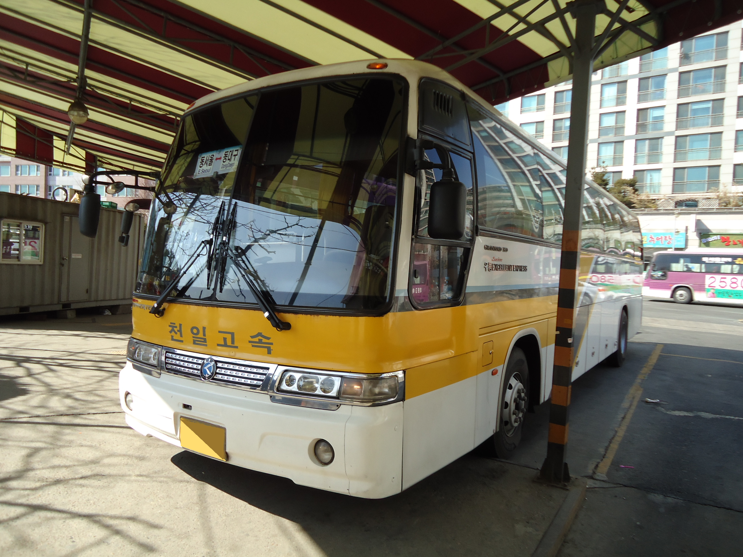 천일고속 그랜버드 HD 선샤인 (동대구→동서울)